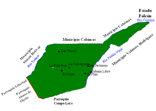 Mapa de la Parroquia Eleazar López Contreras, Municipio Lagunillas, Zulia, Venezuela